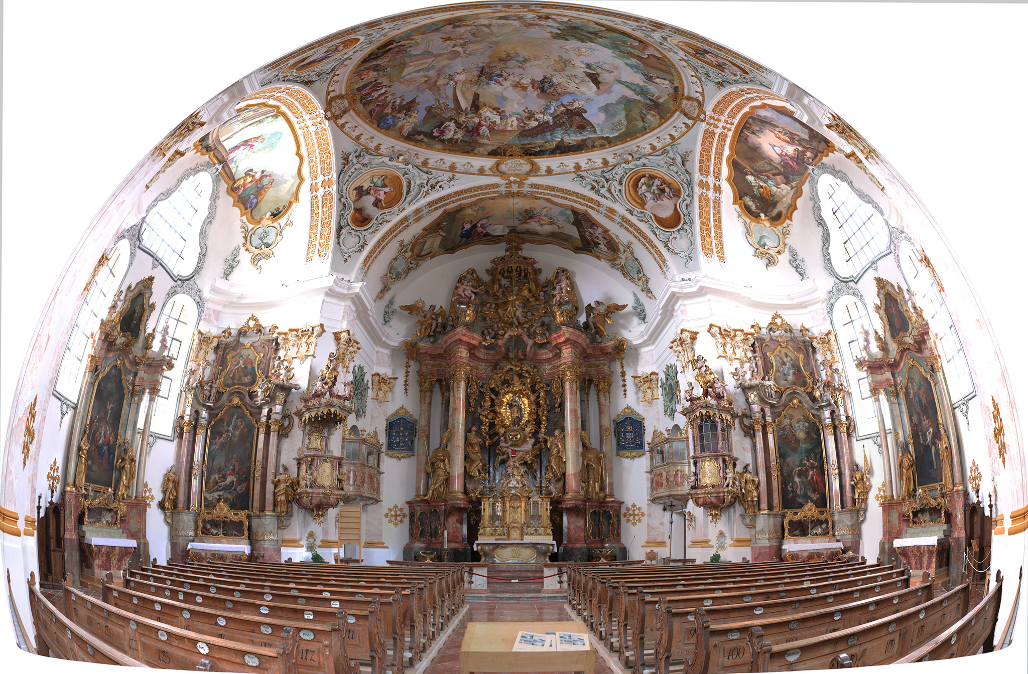 Innenraum der Kirche Mrienberg bei Burghausen